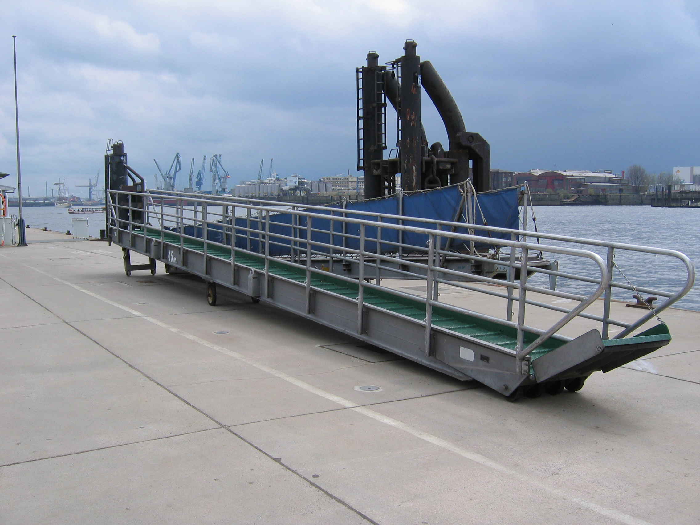 Trap statku MS Cap San Diego (Hamburg)